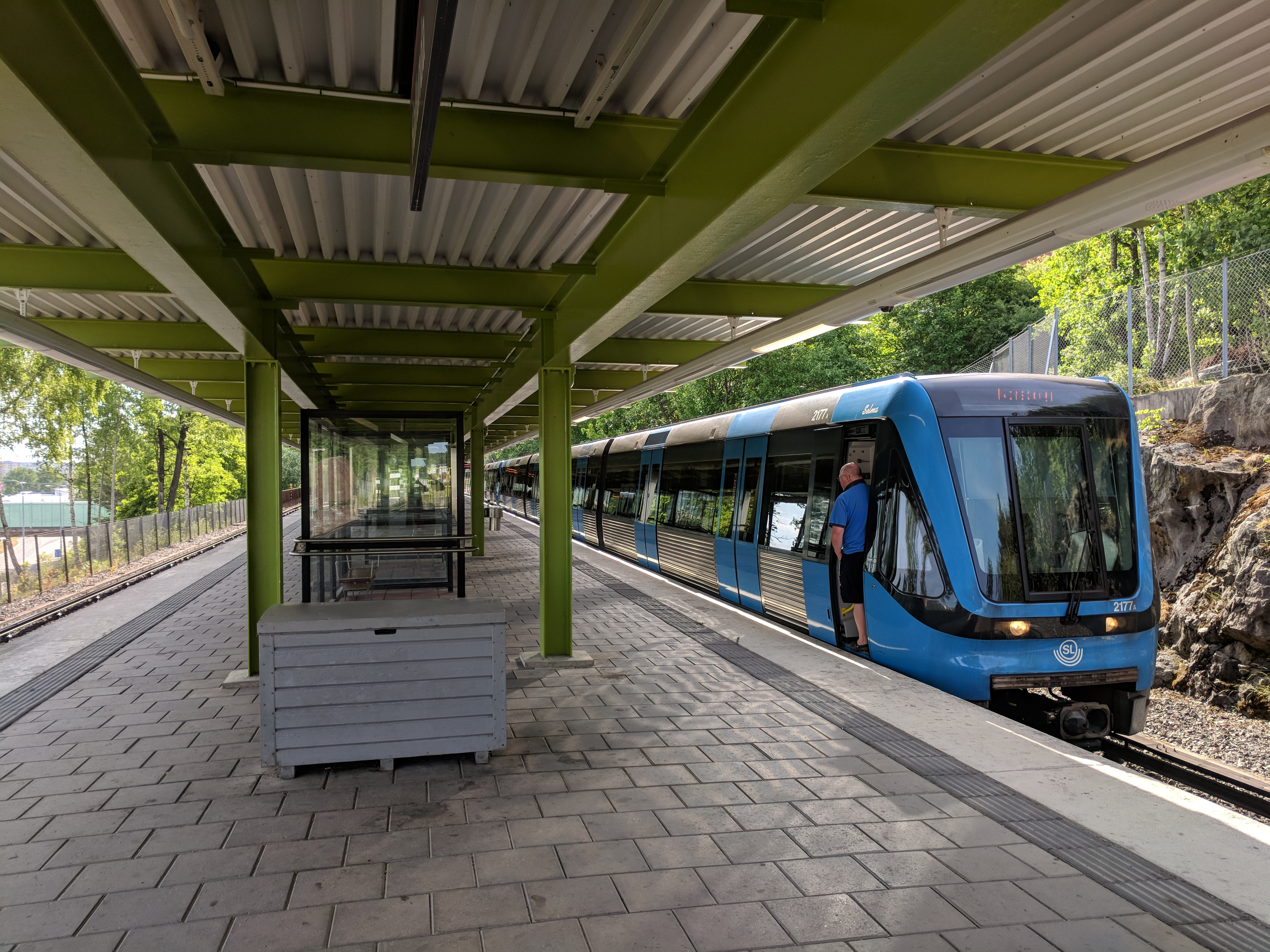 Hallunda tunnelbana